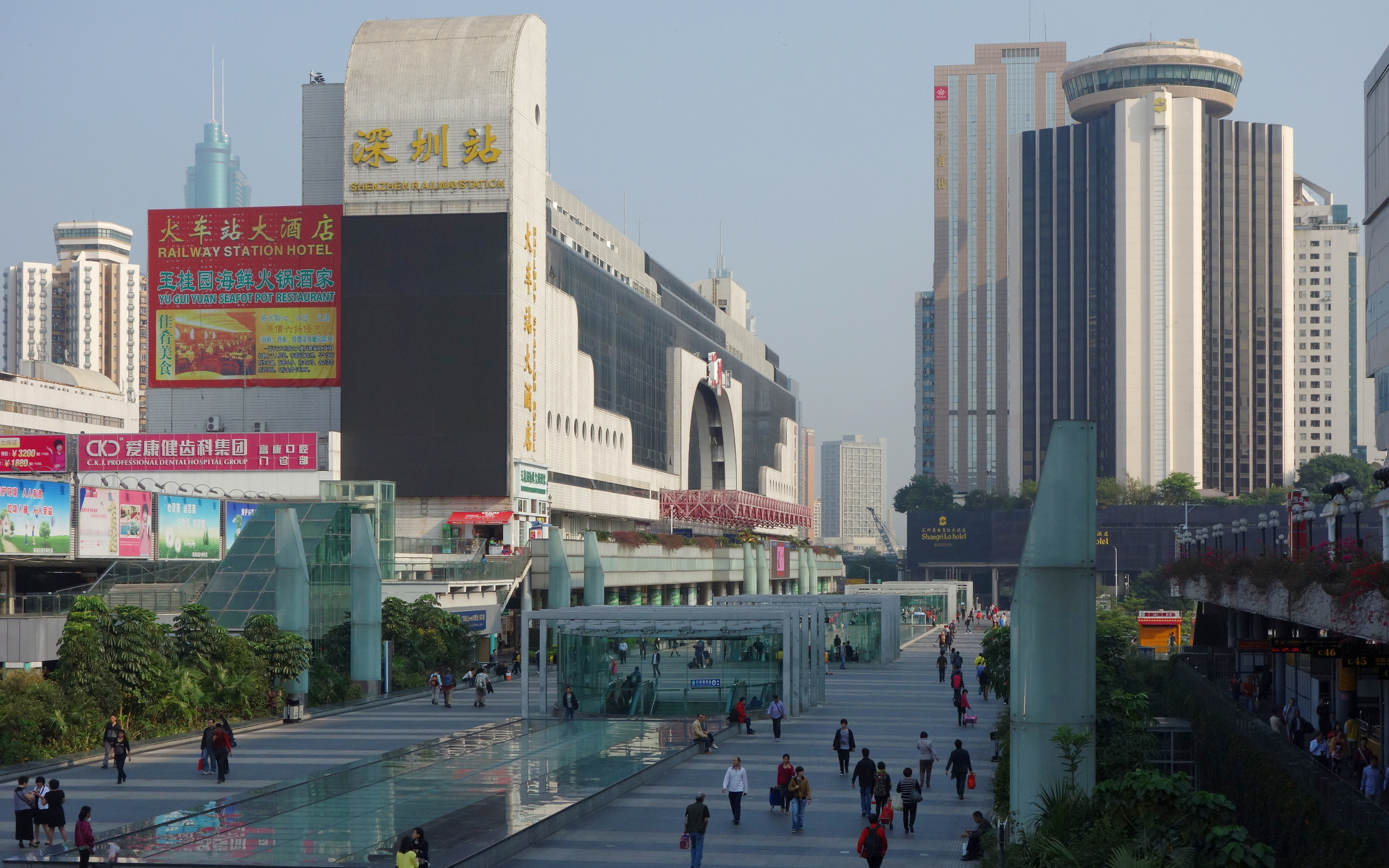 深圳站，當地人也稱為“羅湖火車站”